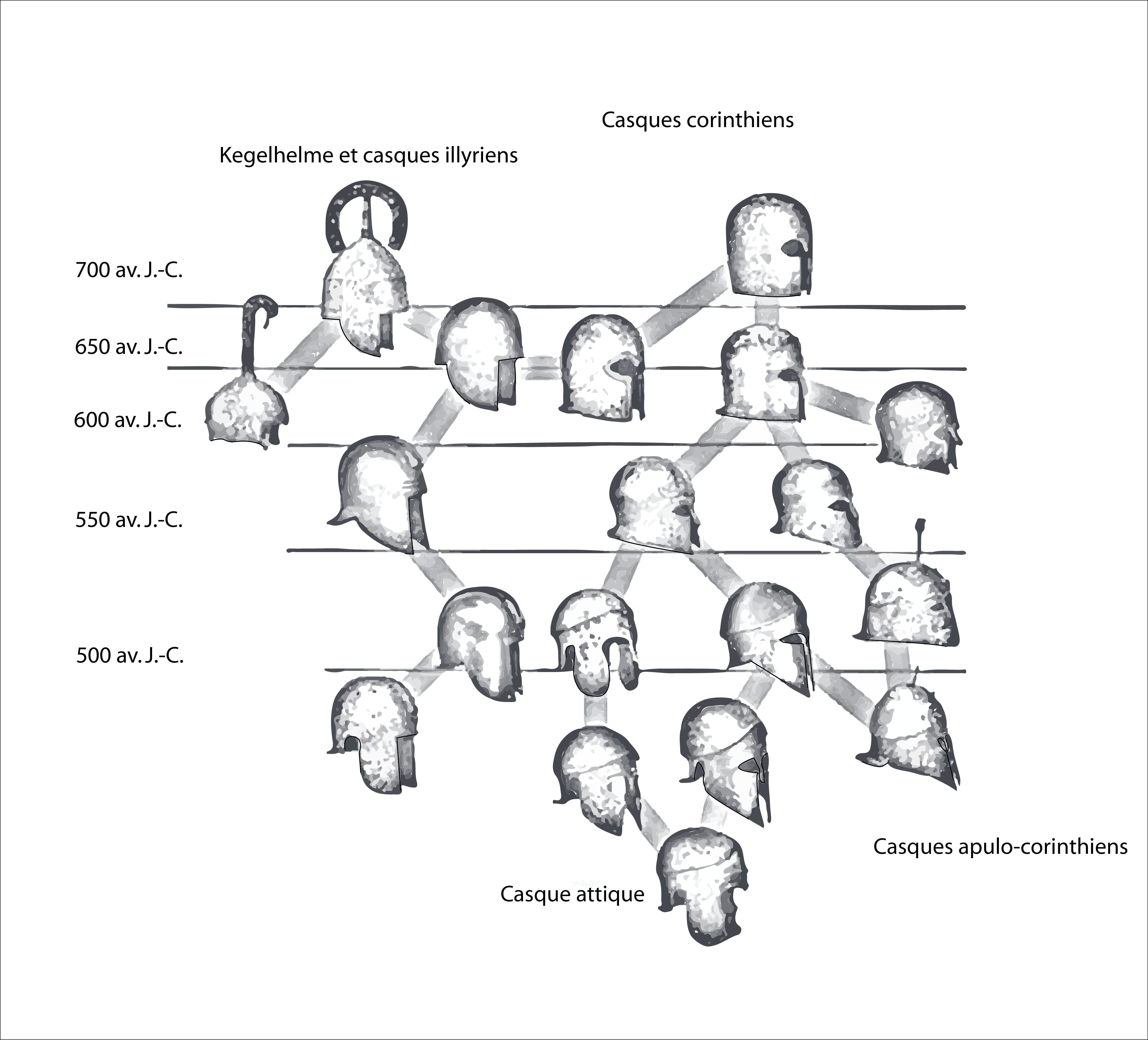 Schéma évolutif des casques grecs